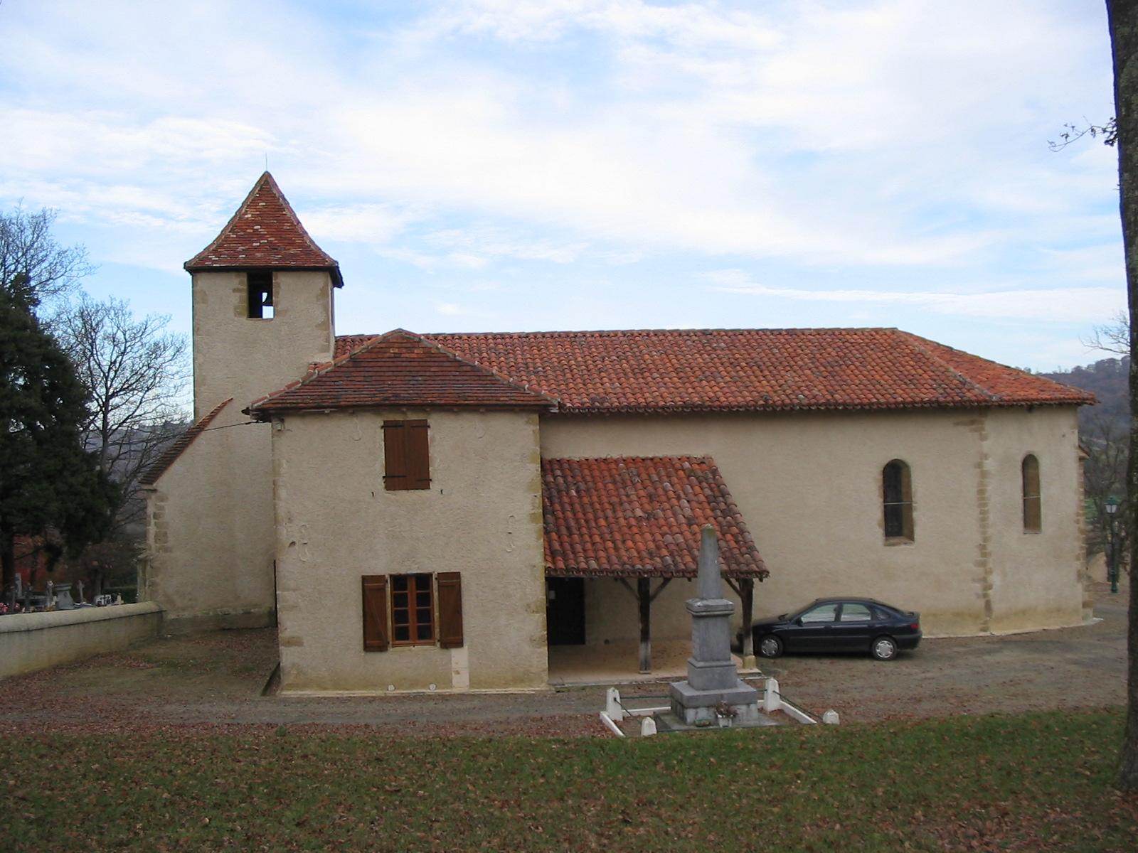 Église Saint-Joseph à Verlus